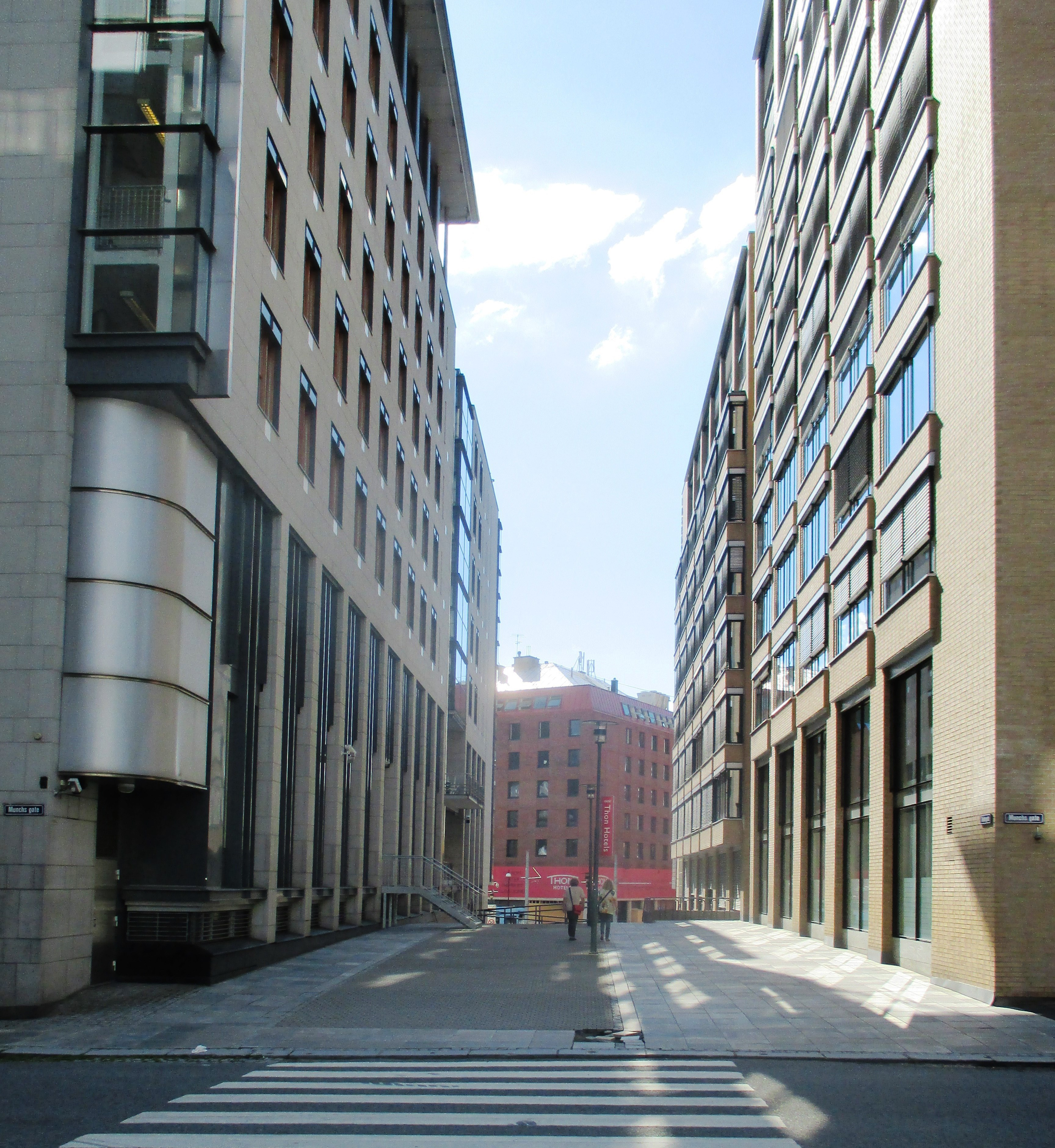 Nedre del av Teatergata i Oslo